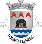 Crest of Fornotelheiro (Portugal)